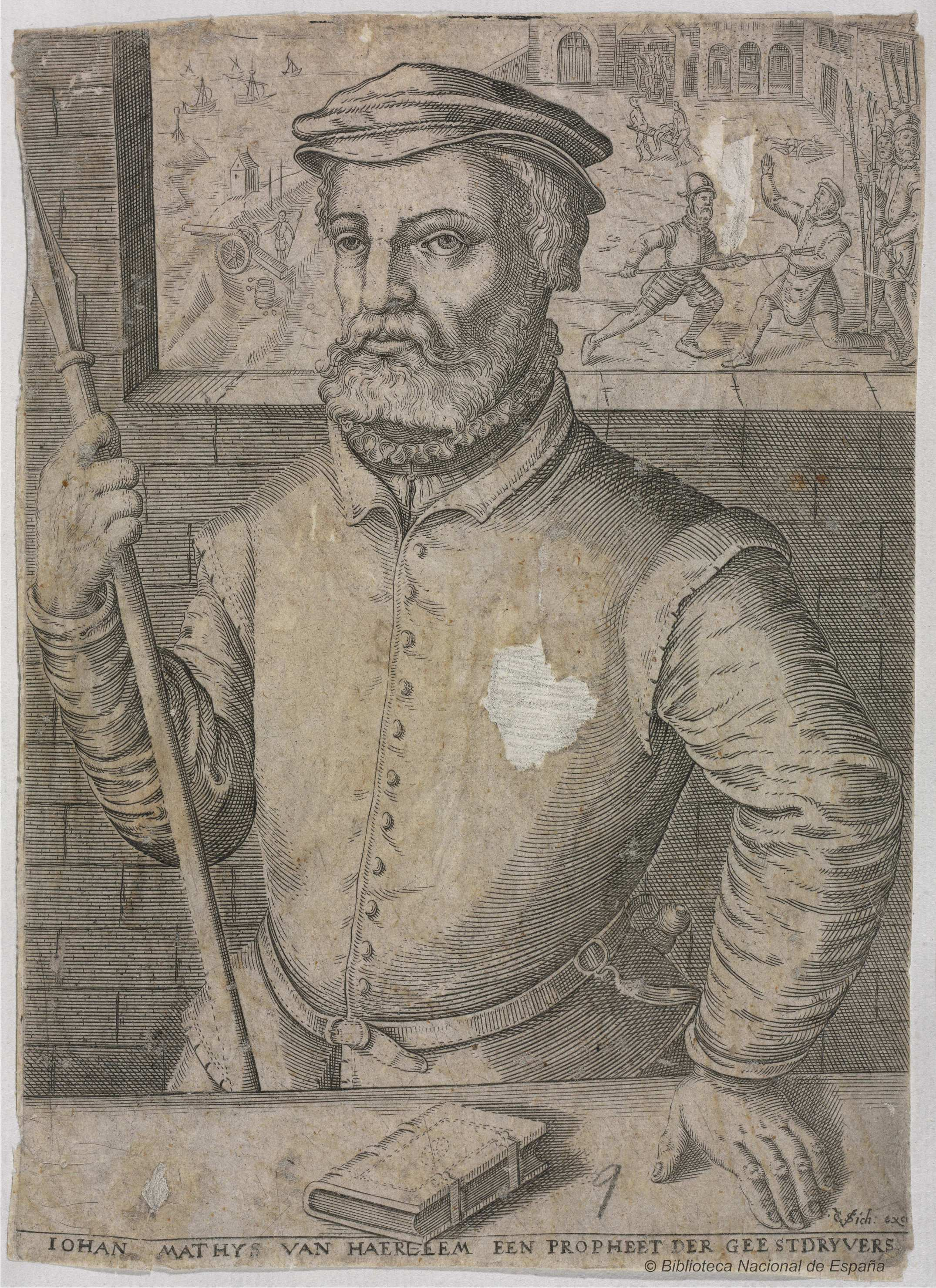 Jan Matthys-Serie de personajes ilustres firmada por Christoffel van Sichem como inventor y editor. Biblioteca Nacional de España